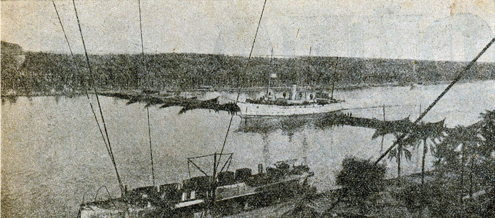 Английская канонерская лодка запирает устье реки Евфрата [в буквальном смысле], содействуя успеху [британских] сухопутных войск, продвигающихся вглубь страны. (подпись под снимком). Османская Империя. Фотография обрезана.